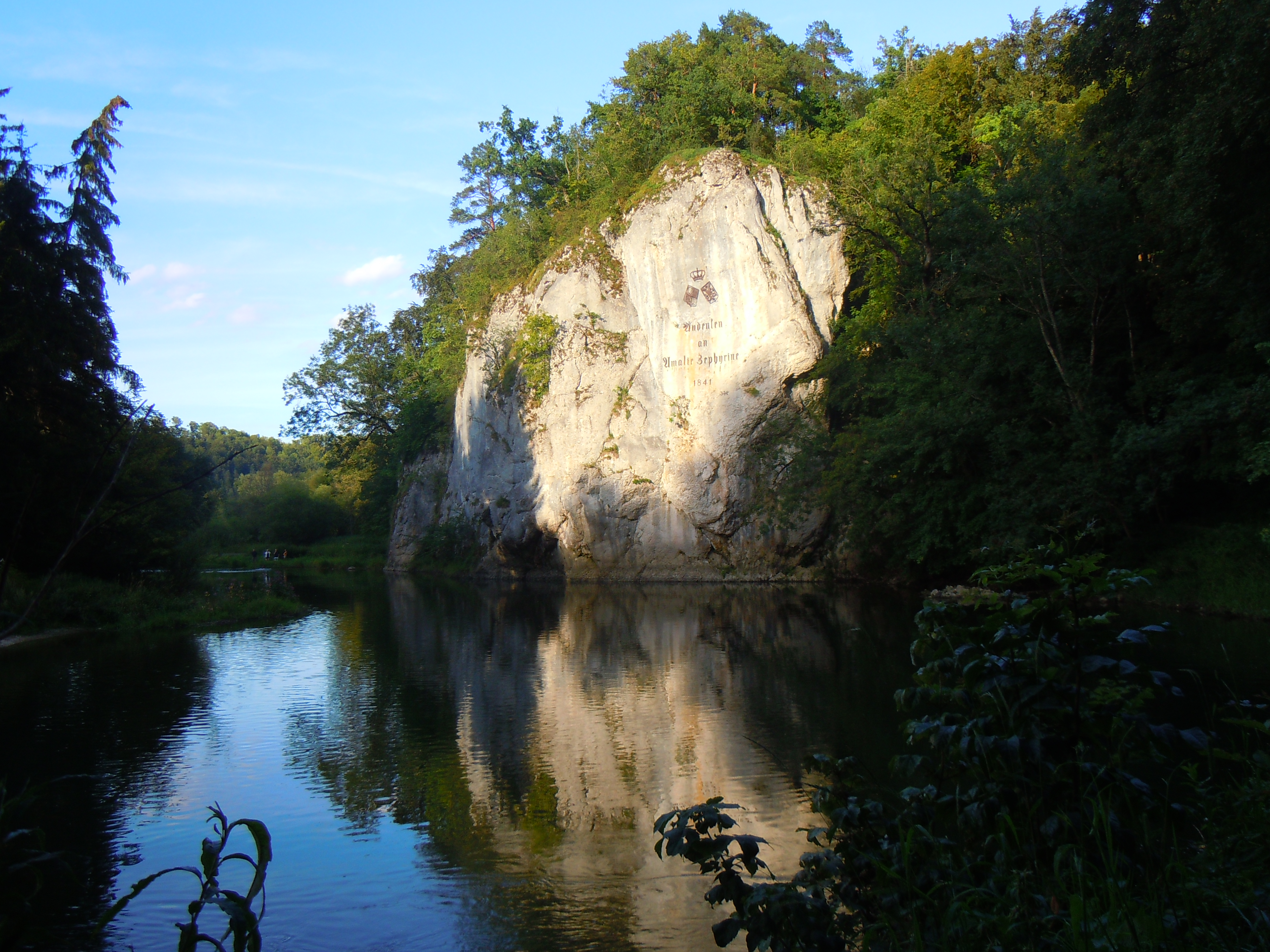 Amalienfelsen an der Donau Inzigkofen